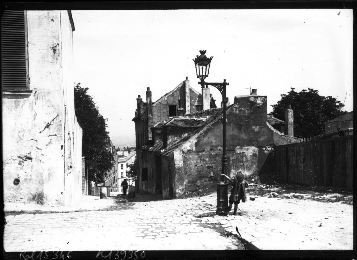 La rue du Mont-Cenis (Paris XVIIIe) en 1911